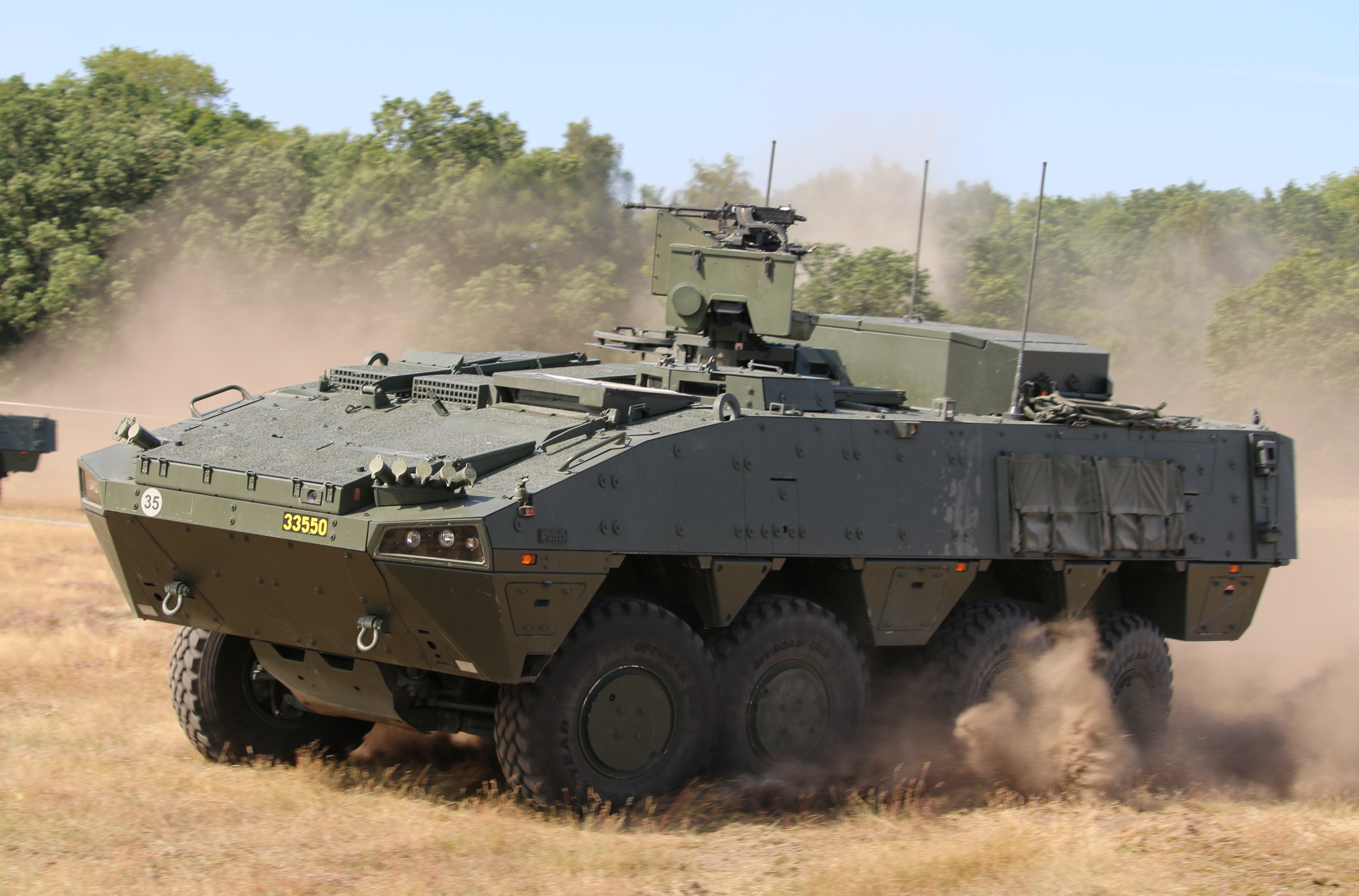 Pansarterrängbil 360 Revinge 2015